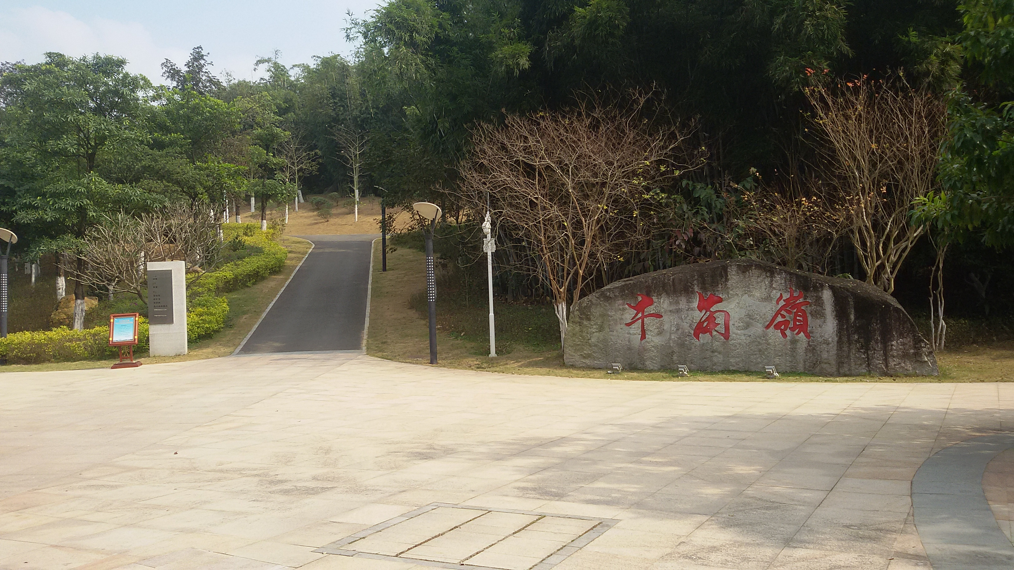 粵語: 牛角嶺濕地公園